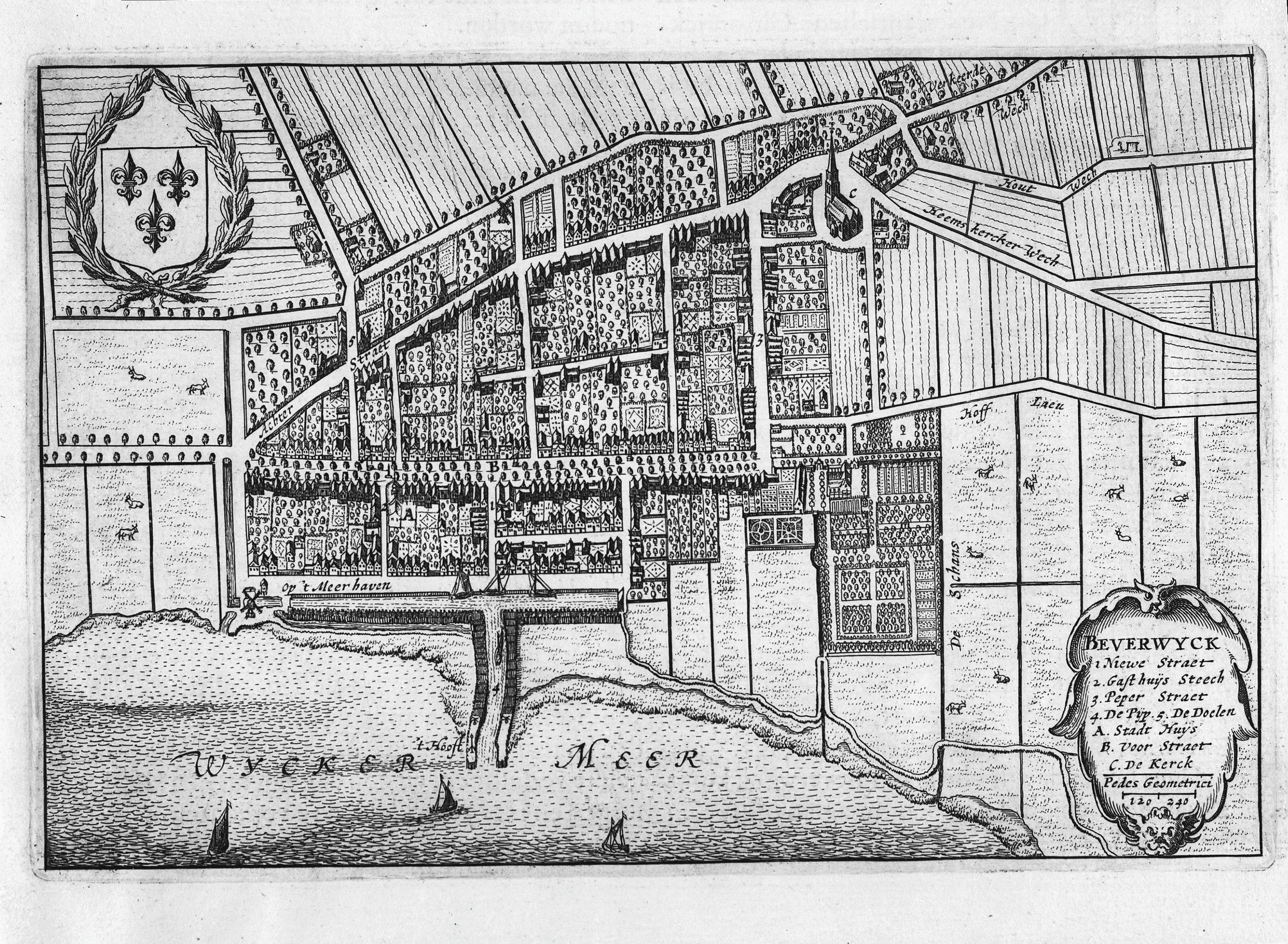 Plattegronden en overzichten: plattegrond van J. Blaeu, reproductie uit album Rijksdienst voor de Monumenten Zorg te Zeist